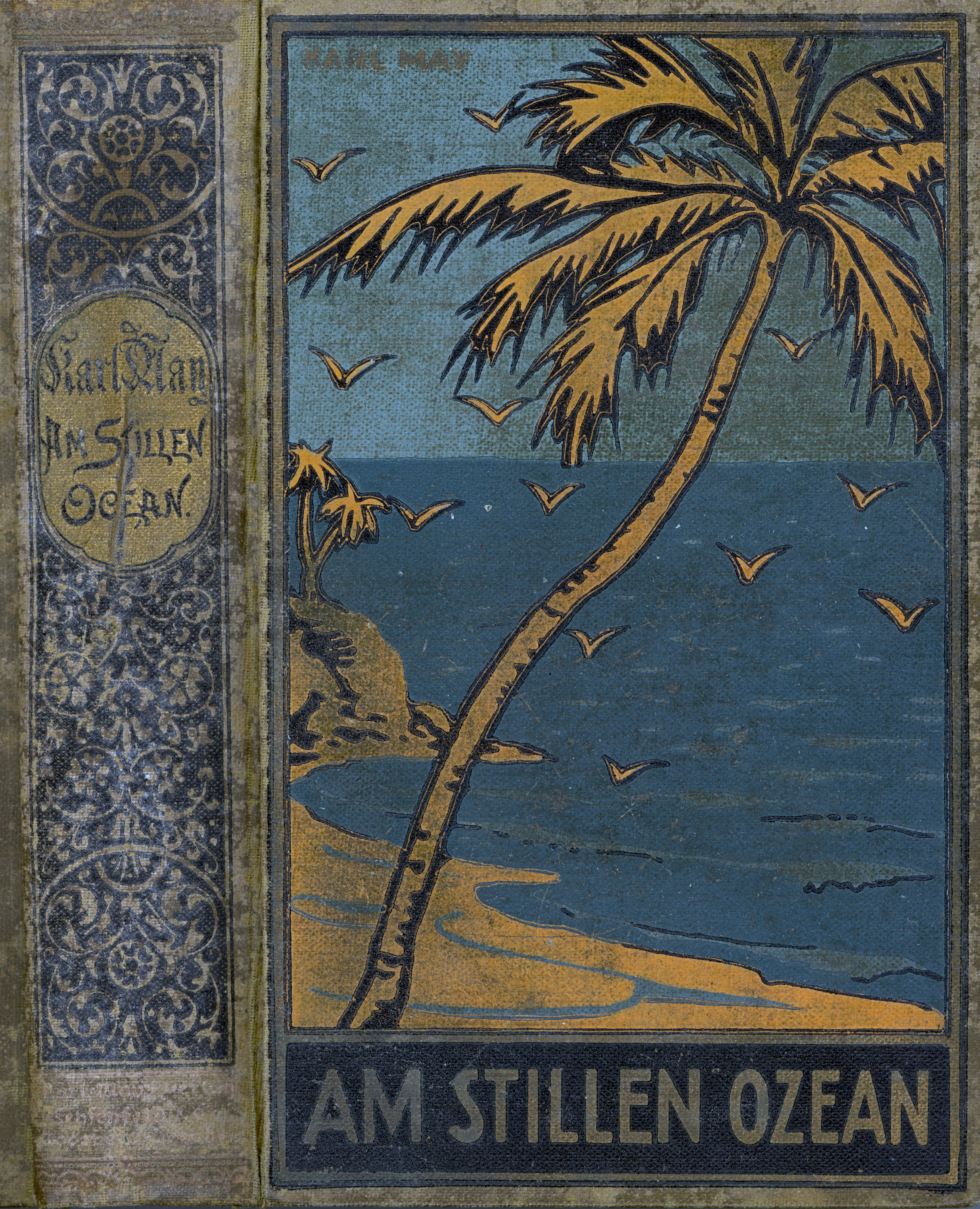 Karl May (gest. 1912), Am Stillen Ozean, Buchdeckel, ca. 1914, Karl-May-Verlag, Schöpfer des Titelbides (vermutlich): Sascha Schneider (gest. 1927)